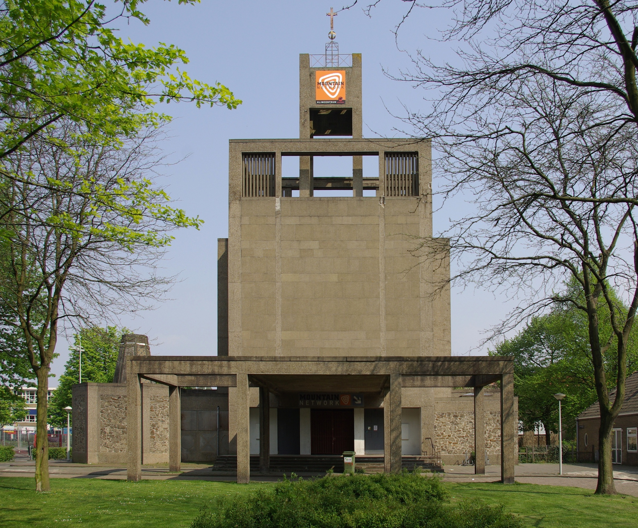 De Sint-Josephkerk aan de Erik de Roodestraat in Amsterdam Bos en Lommer is gebouwd in 1950 tot 1952 door de architecten G.H.M. Holt en K.P. Tholens. Het gebouw werd als kerk gebruikt tot 1990. Thans is het in gebruik als klimhal. Na voordracht in 2007 via de lijst van rijksmonumenten uit de periode 1940-1958, opgesteld door Ronald Plasterk, werd de Sint-Josephkerk erkend als rijksmonument. 82″ N, 4° 50′ 41.28″ E